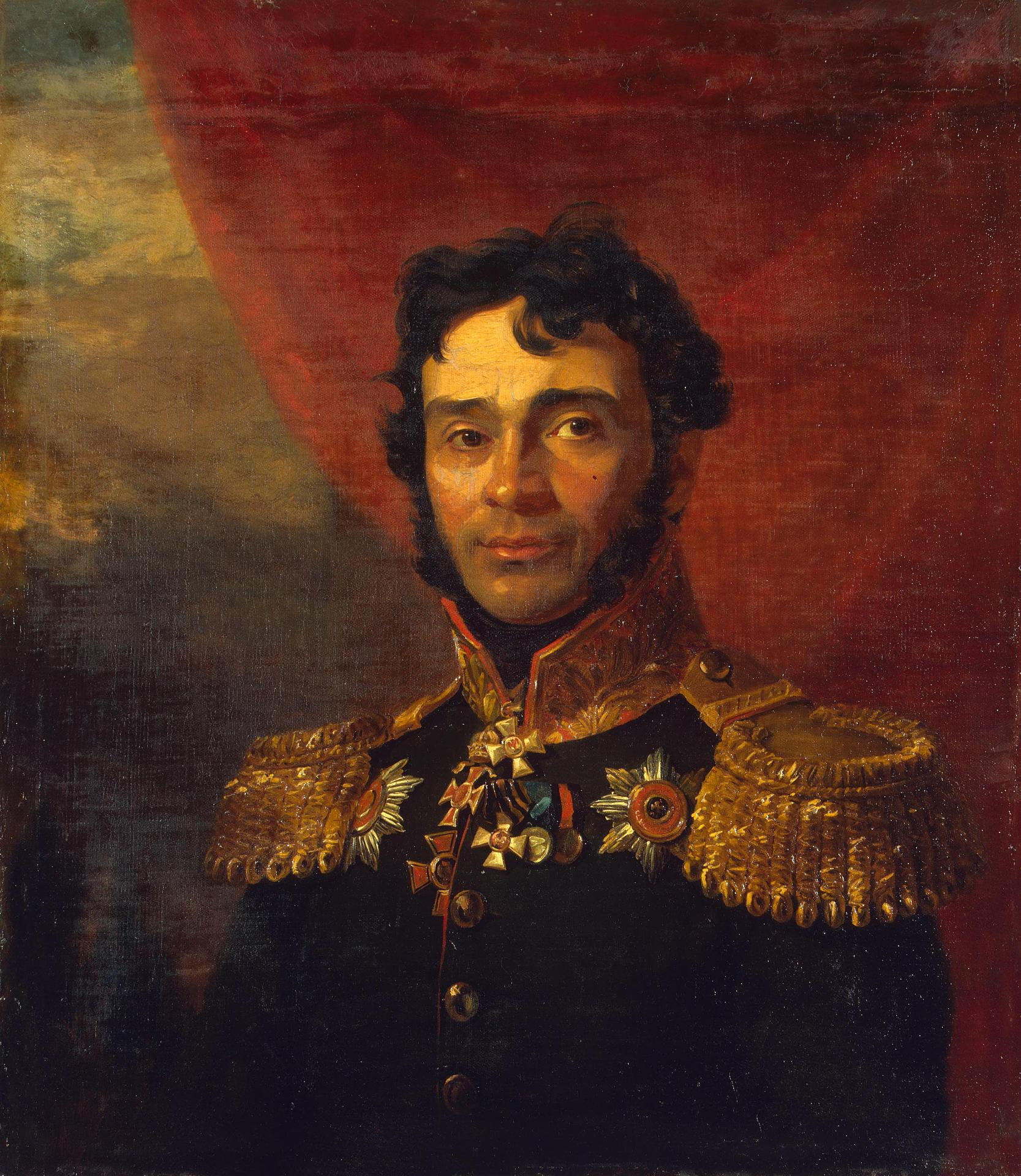 Vladimir Petrovich Mezencev 1-st (22.12.1781 – 02.01.1833) russian general